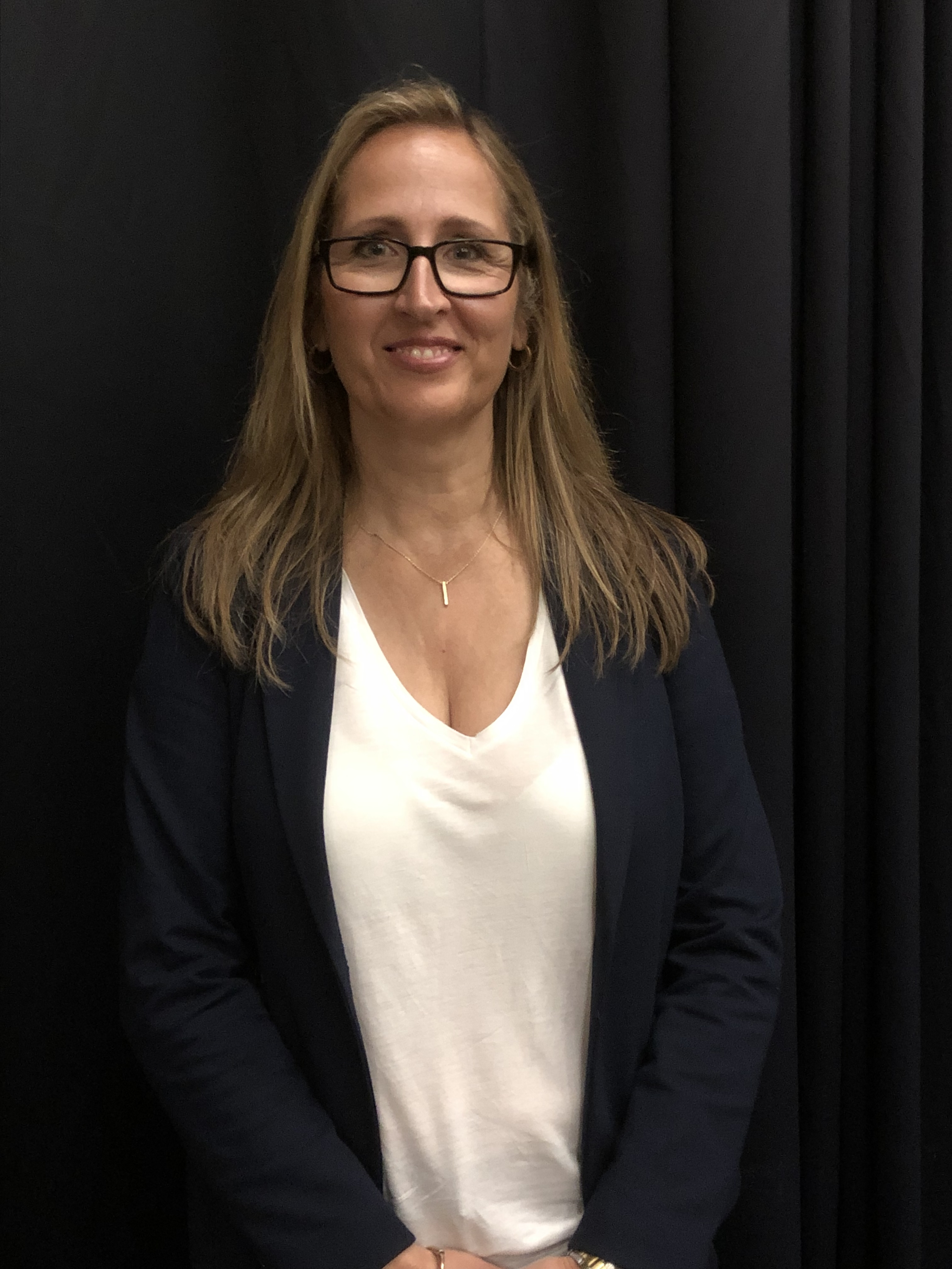 Den svenska journalisten Sanna Klinghoffer, juni 2019